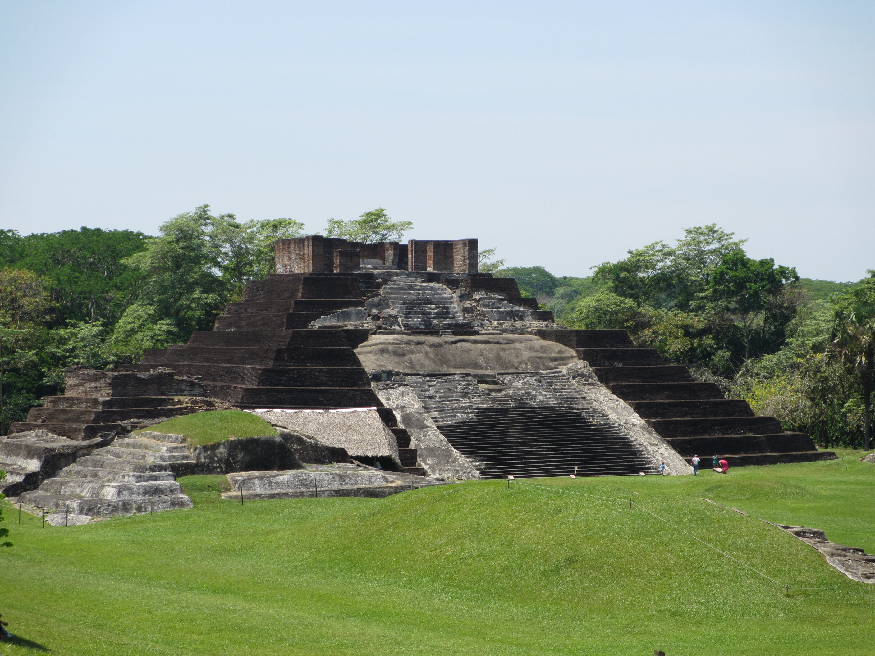 Vista del Templo 1 de la zona arqueológica de Comalcalco. Tabasco. México.